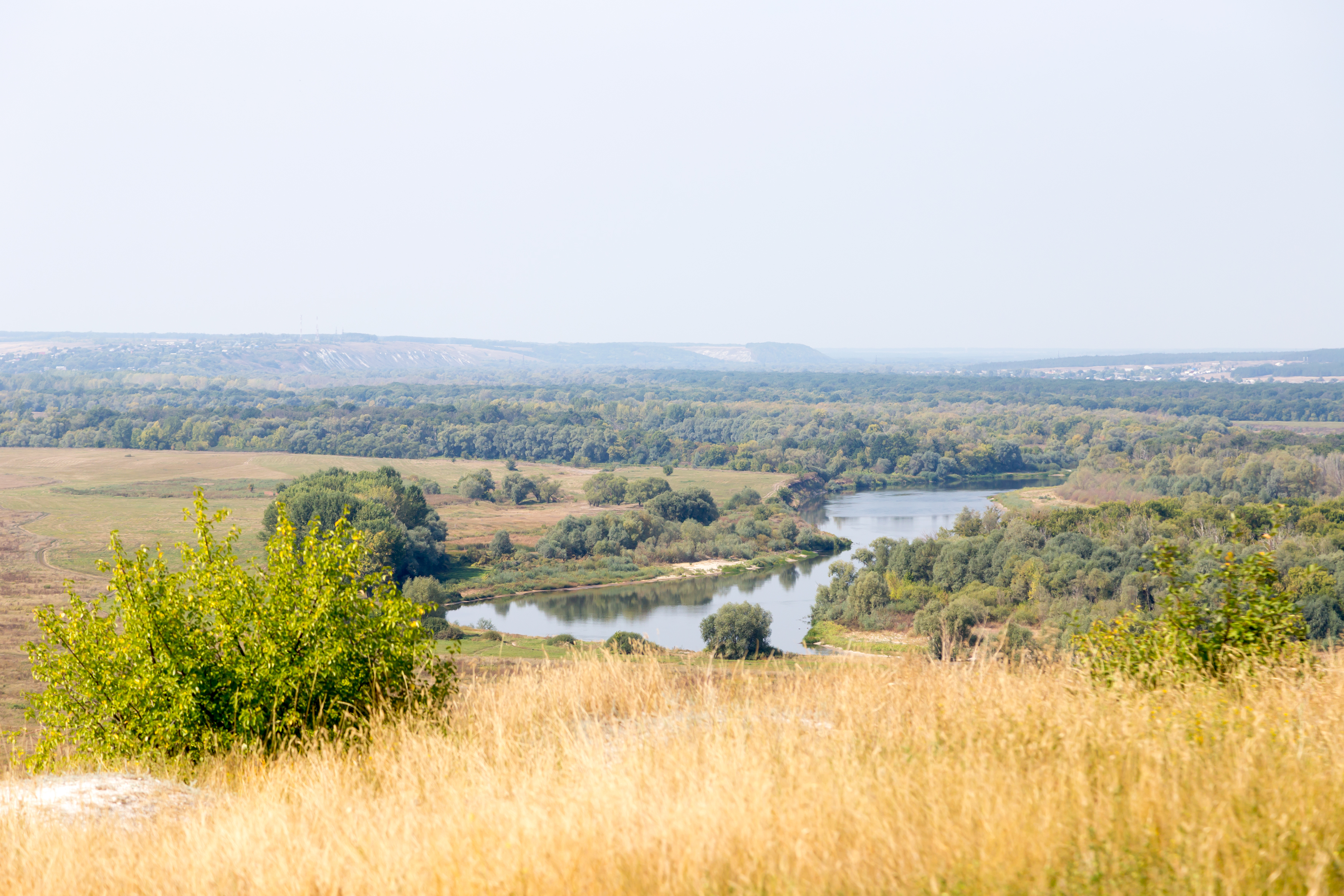 Затон Богатый: На р. Дон у с. Копанище, Лискинский район, Воронежская область This image is related to the protected area of Russia number 3610110